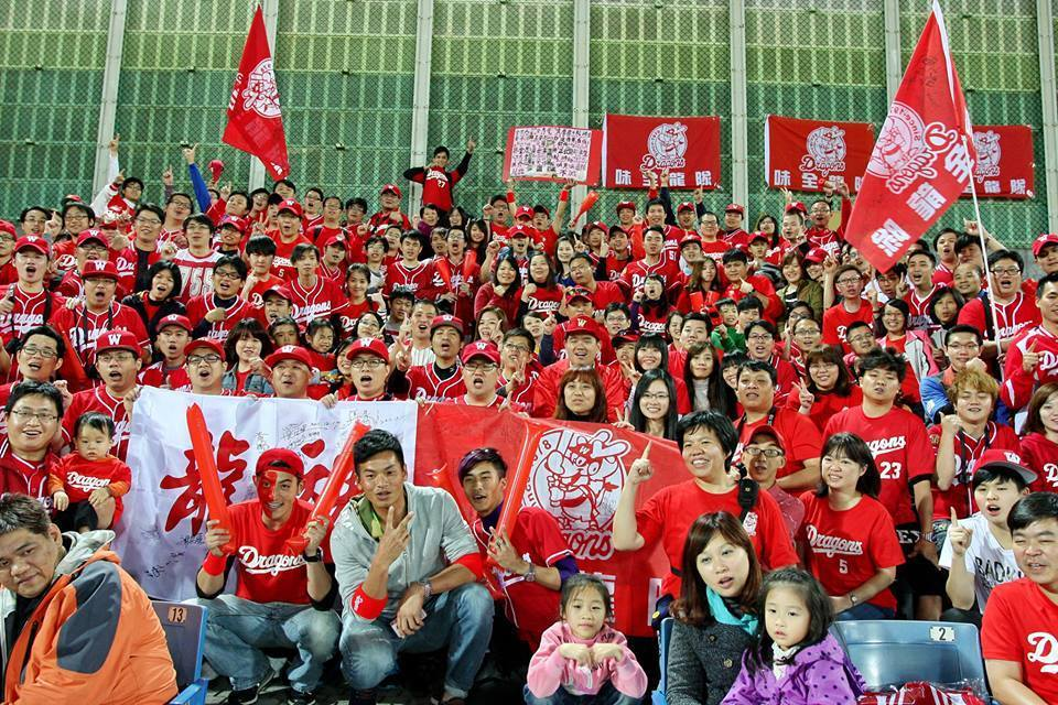 解散多年，仍有無數的龍迷集結起來為昔日球員偶像加油。